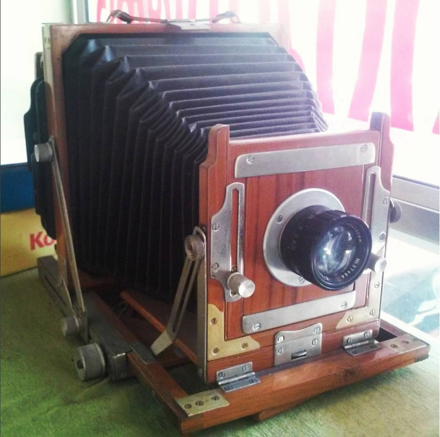 കാമറയുടെ ഒരു പതിപ്പ് ആലപ്പുഴ ജില്ല കോടതിക്ക് അടുത്തുള്ള സ്റ്റുഡിയോയില്‍